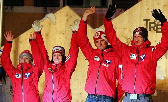 Gregor Schlierenzauer, Thomas Morgenstern, Chiara Hoelzl i Jacqueline Seifriedsberger podczas dekoracji medalistów konkursu drużyn mieszanych na skoczni normalnej (Mistrzostwa Świata 2013, Val di Fiemme).